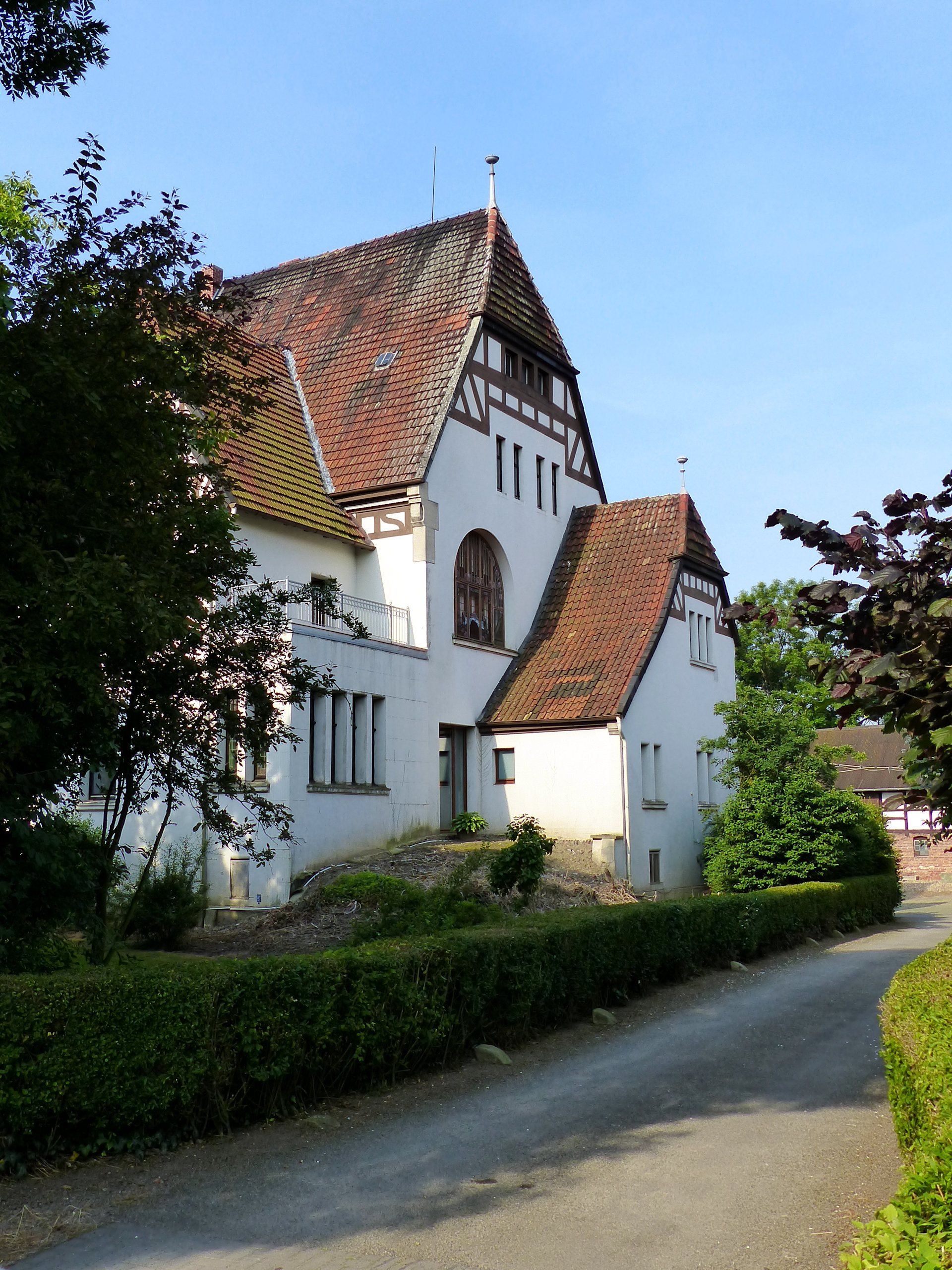 Ansicht des Rübenschlosses von Osten, über dem Vordach das Jugenstilfenster.